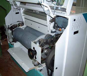 Beschreibung:de:Walzenstuhl, Fabrikat Bühler AG; Typ MDDM/MDDO, in einer Mehlmühle Fotograf: Benutzer:burgkirsch 2004 Quellenangabe und Beleg an burgkirsch(at)web.de erbeten.